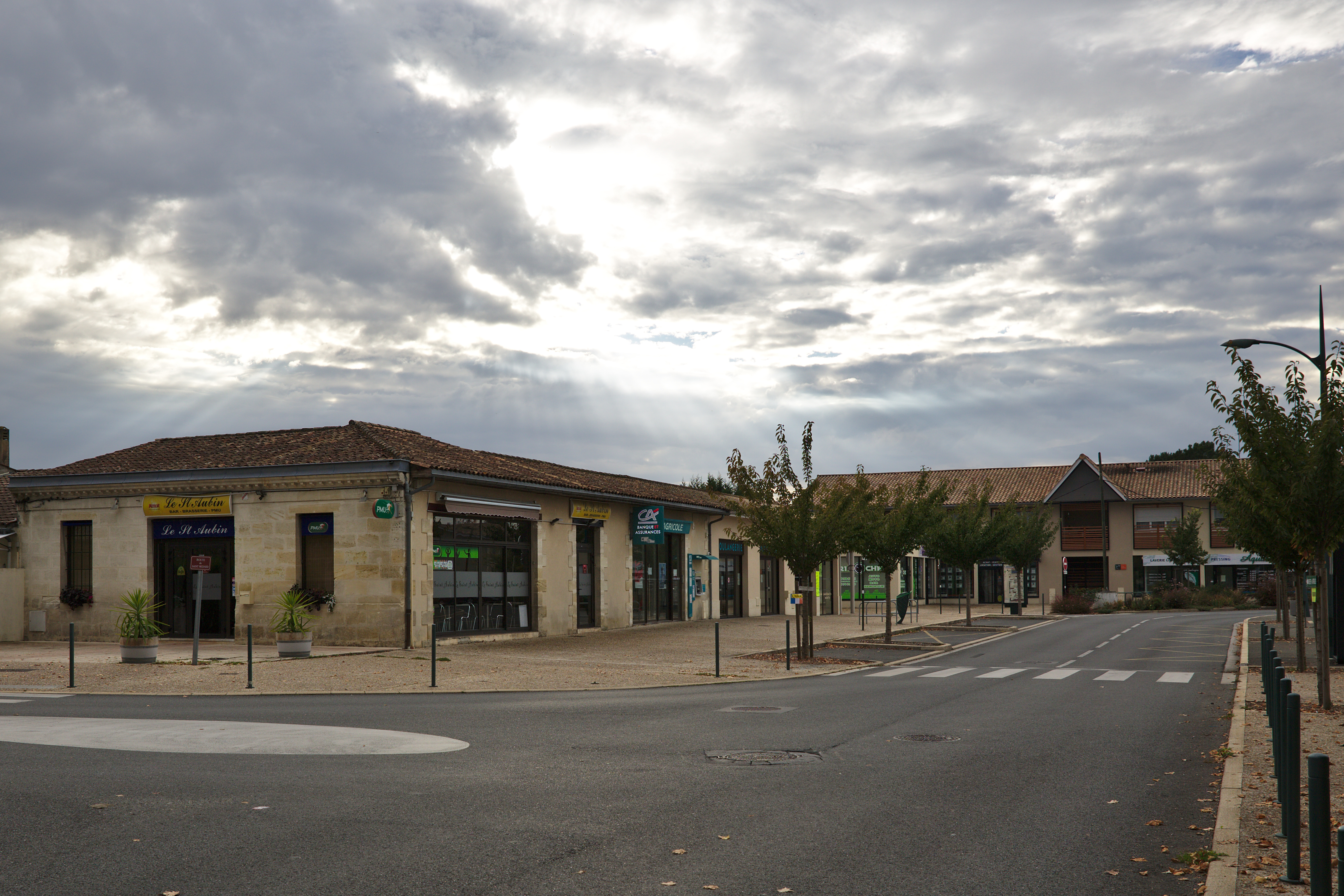 Commerces du centre